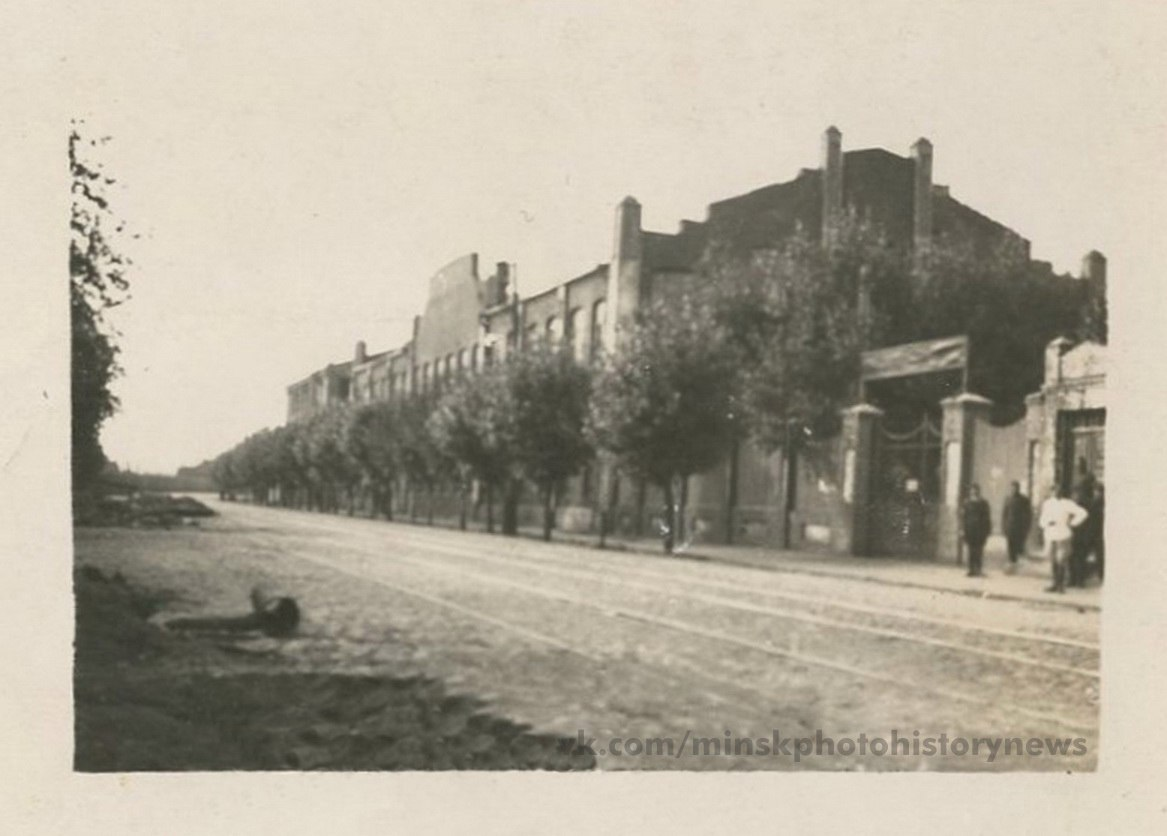 Беларуская (тарашкевіца): Менск (Miensk), Ляхаўка (Lachaŭka). Гарбарны завод